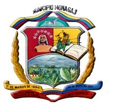 Escudo oficial del Municipio Autonomo Jose Tadeo Monagas del Estado Guarico